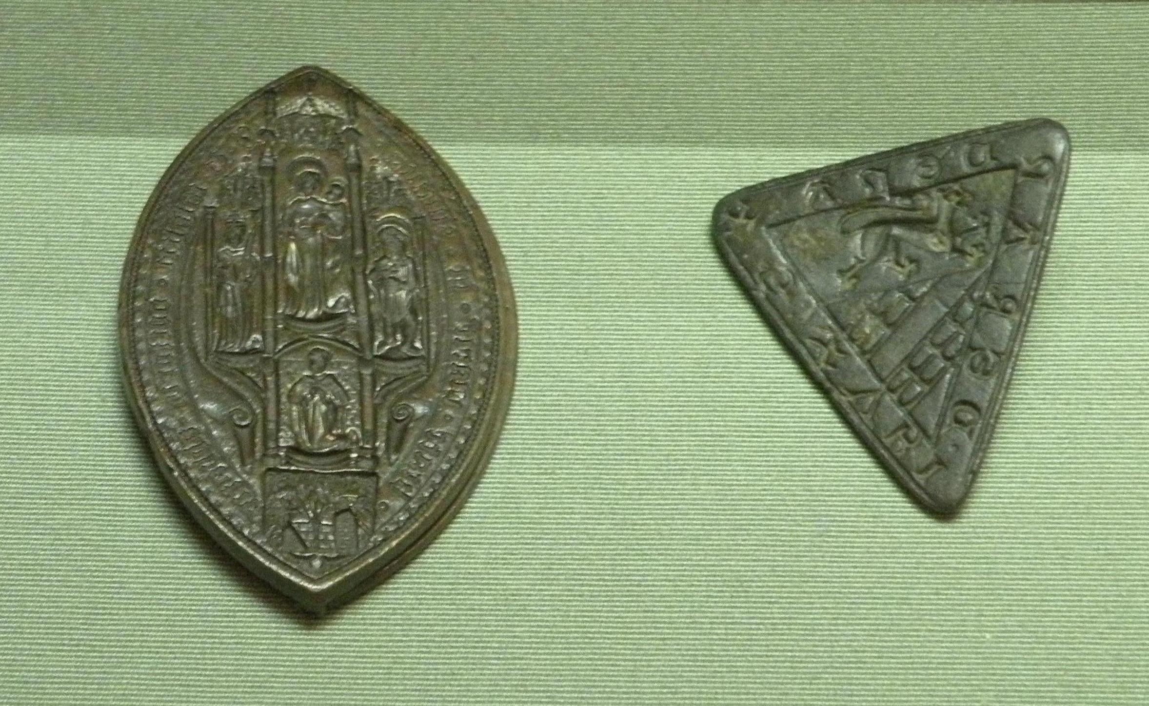 matrice de sceau en bronze du XVe le sceau triangulaire est espagnole